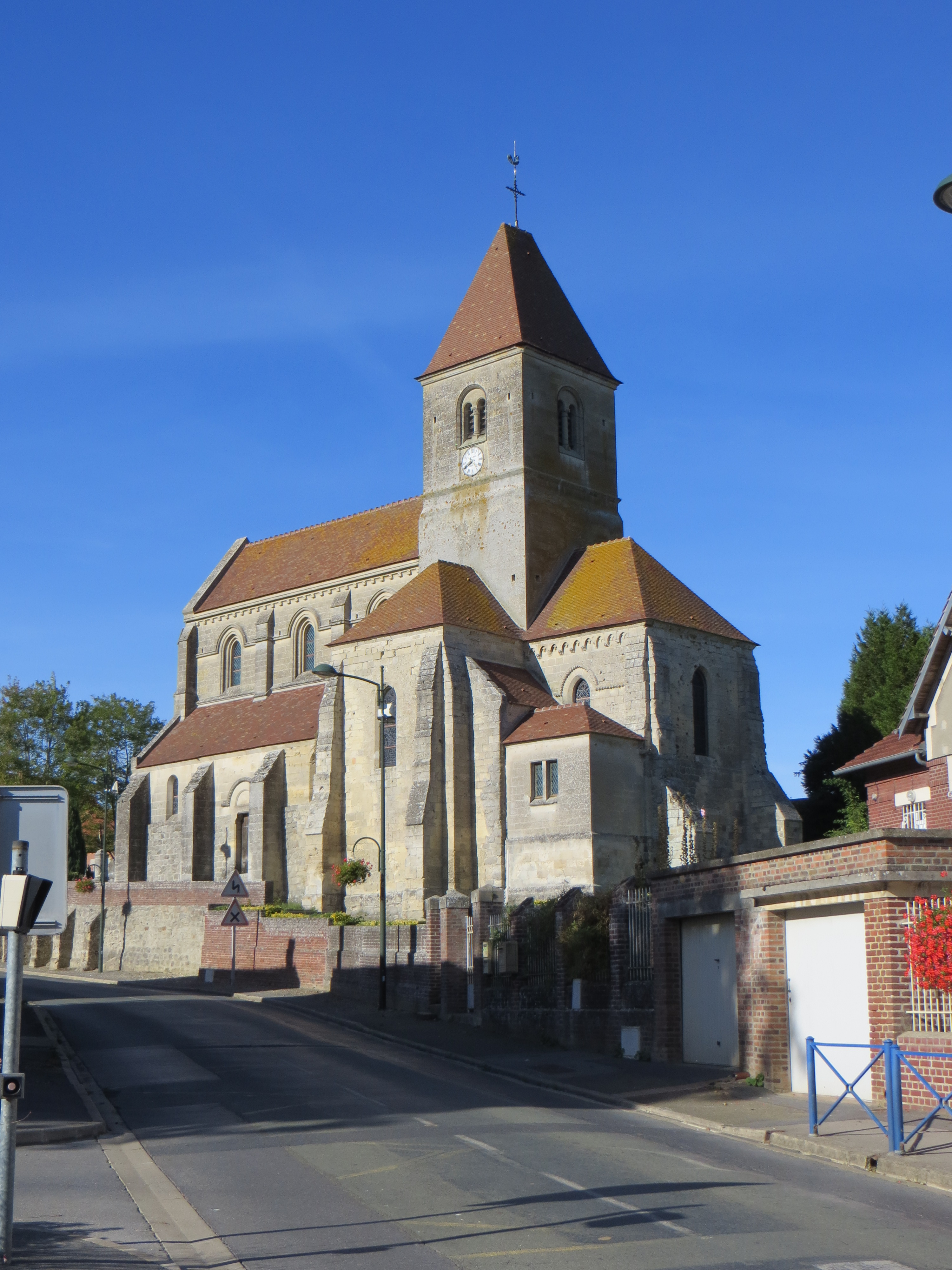 Vue générale de l'église